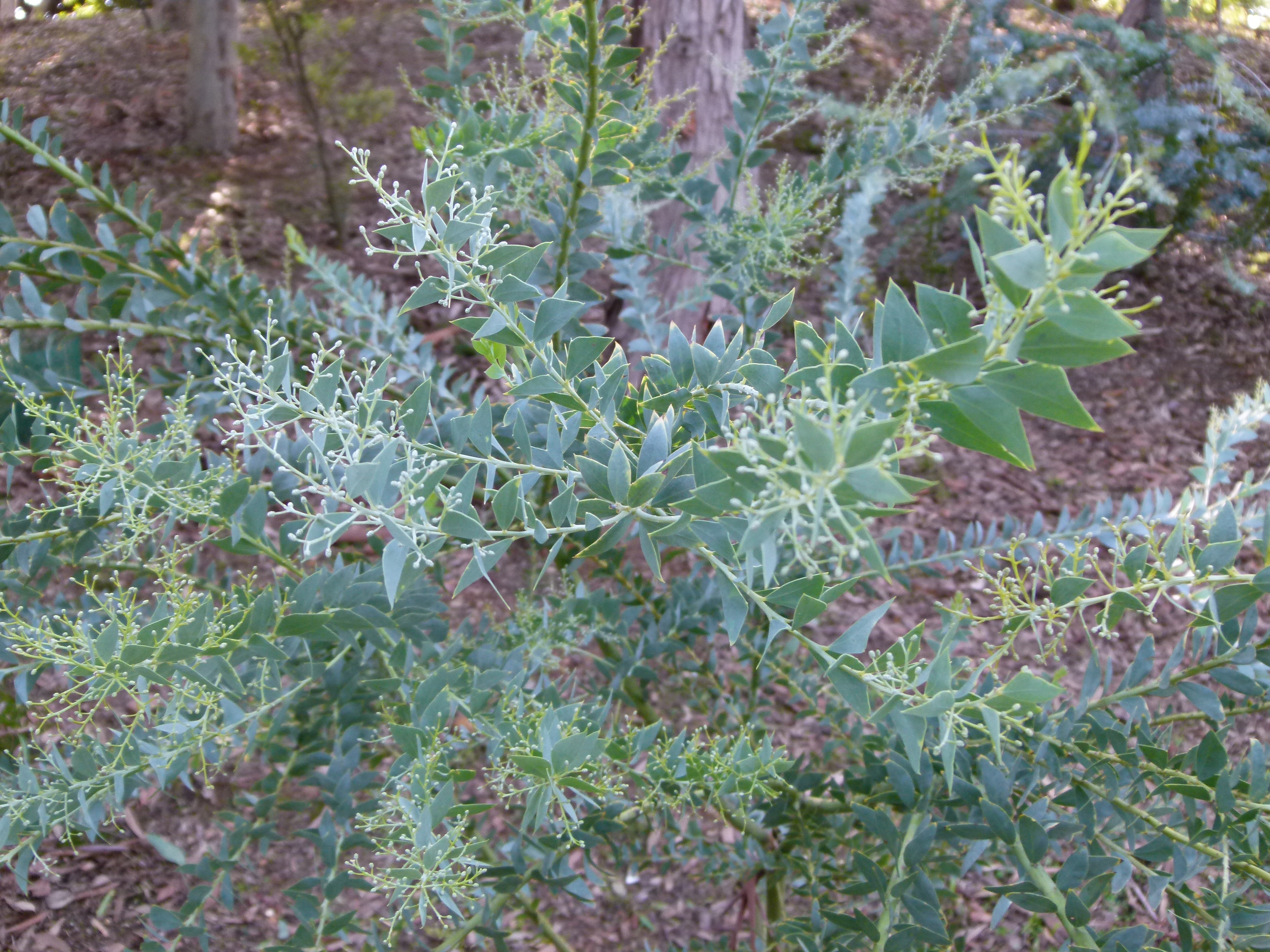 Jardin botanique Montjuic, Barcelone.